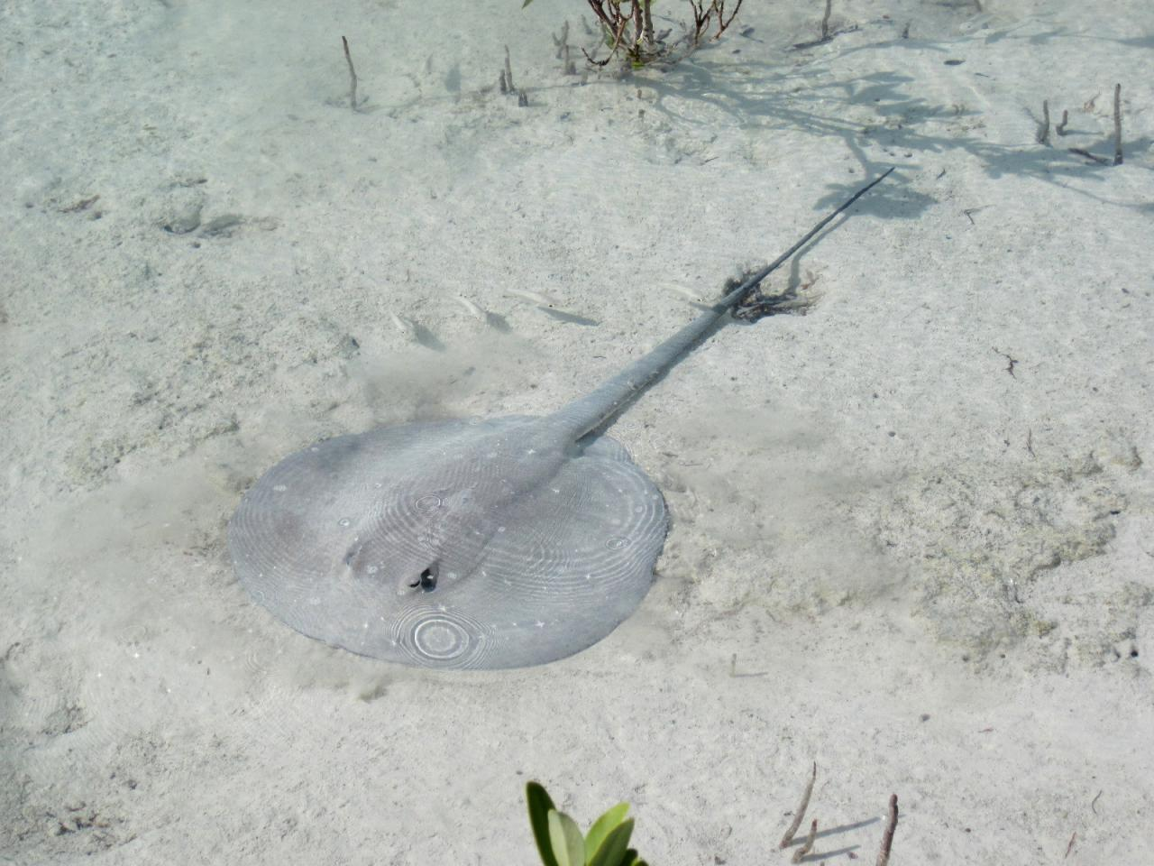 Chupare stingray (Himantura scharmdae) at Bitter Guana Cay, Bahamas